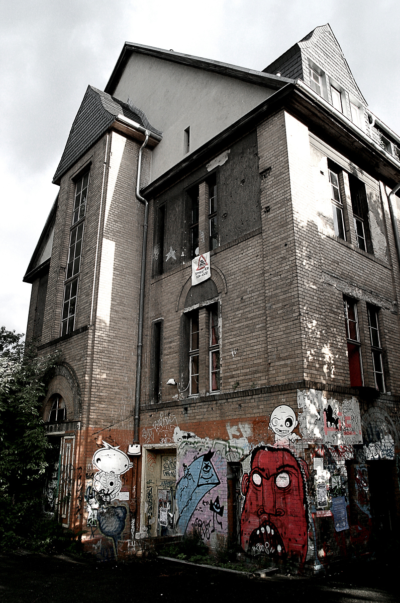 Primera okupa de Berlin, 1971. Nombre de la casa en homenaje a Greog von Rauch, militante del grupo anarquista armado 2 de Junio. Hoy, ya bajo contrato, funciona una casa colectiva para unas 40 personas de muy variada procedencia y un centro socio-cultural autogestinado. web casa: sobre el tipo: (pésimo artículo) Photo Edition: Liberto und Benni